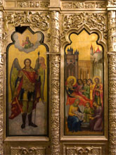 Церковь трех патриархов